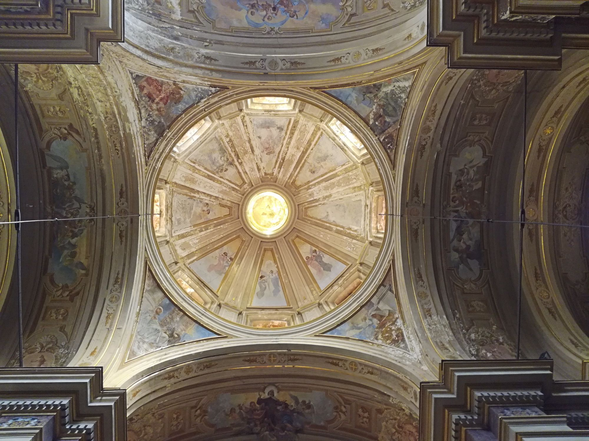 Cupola S. Teresa a Chiaia, Napoli